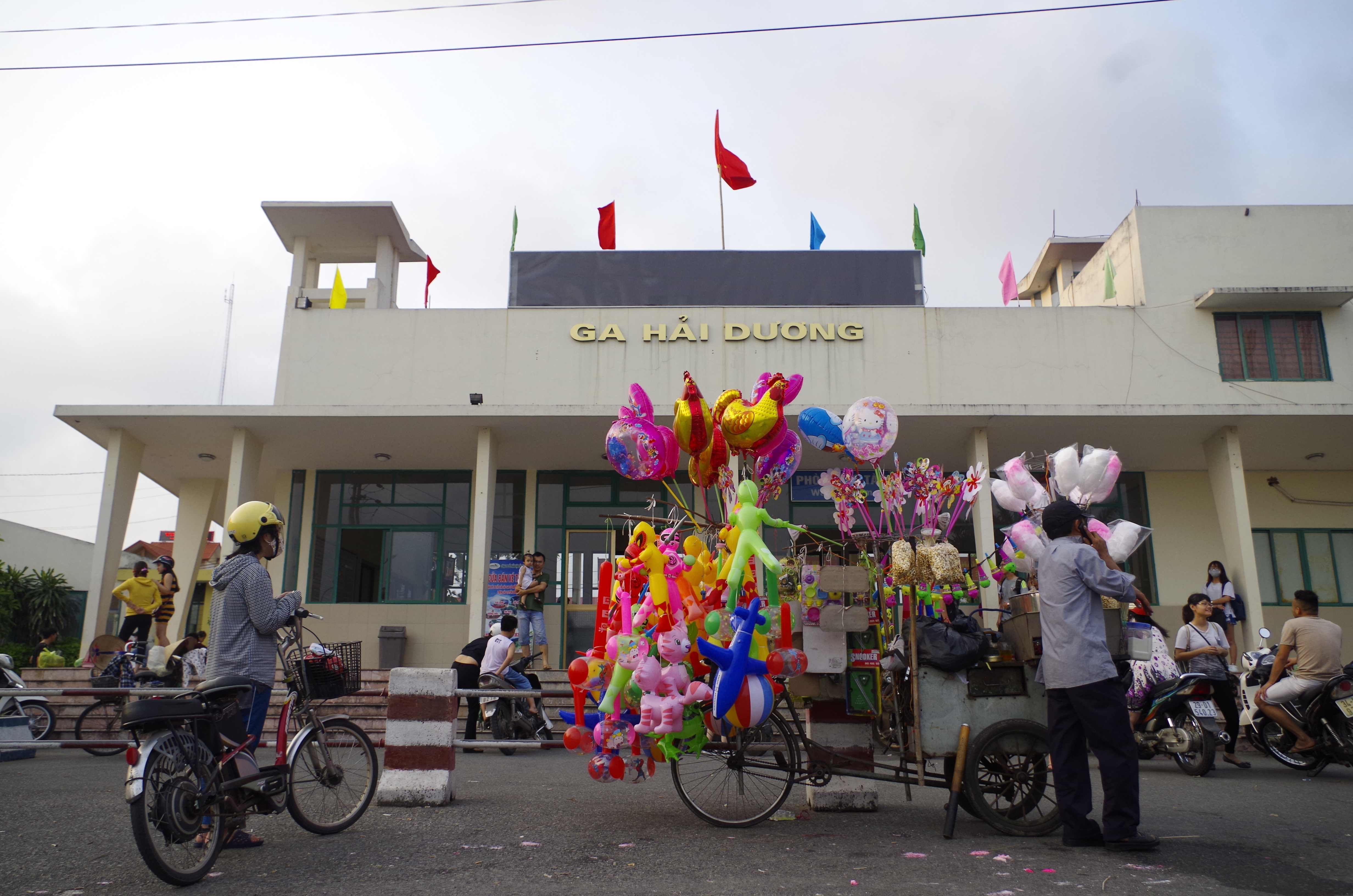 北江站（2017年05月02日）